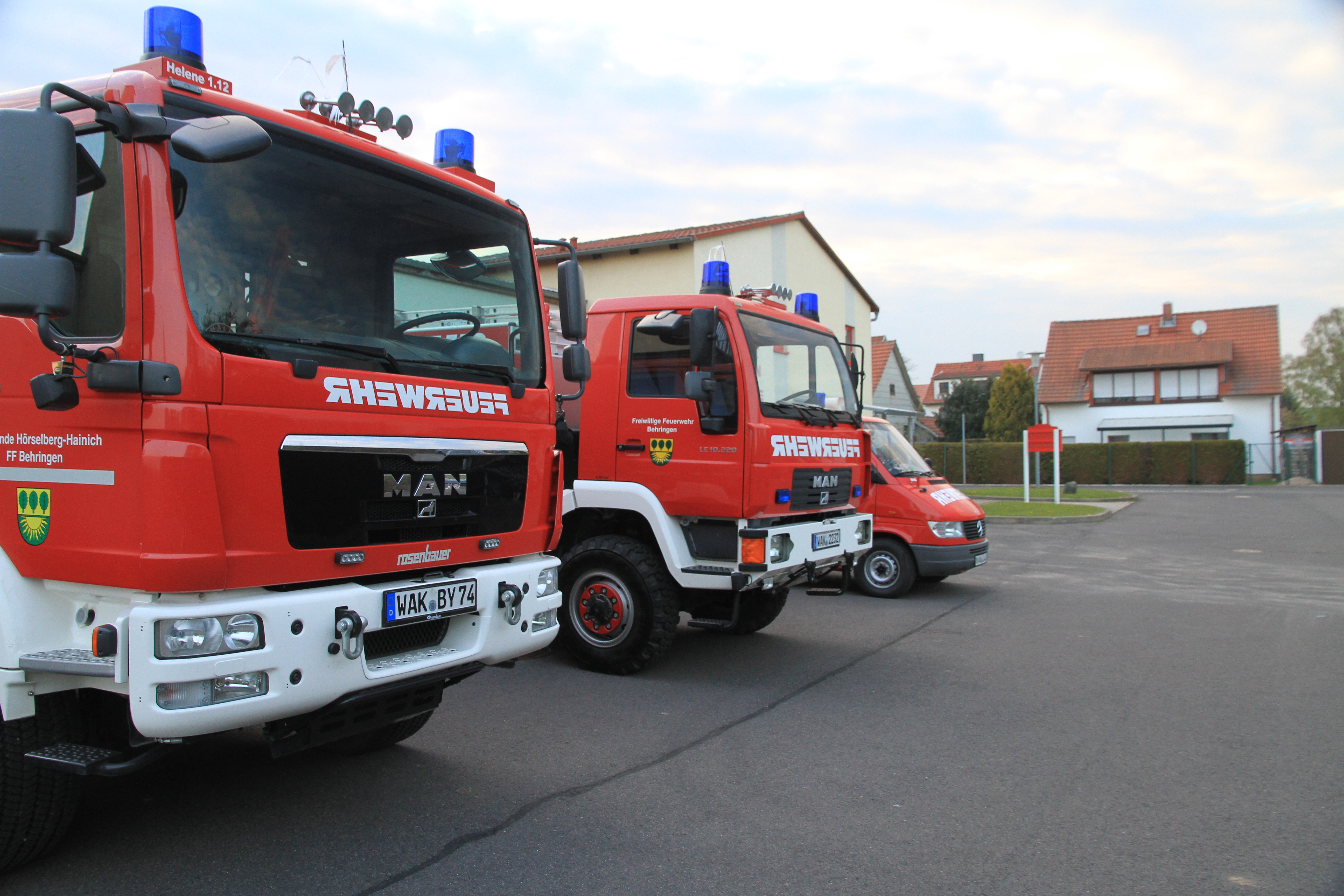 Fahrzeuge der Feuerwehr Behringen